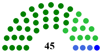 composicion del Congreso en 1953